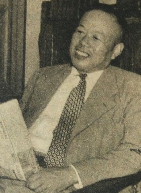 武藤嘉一